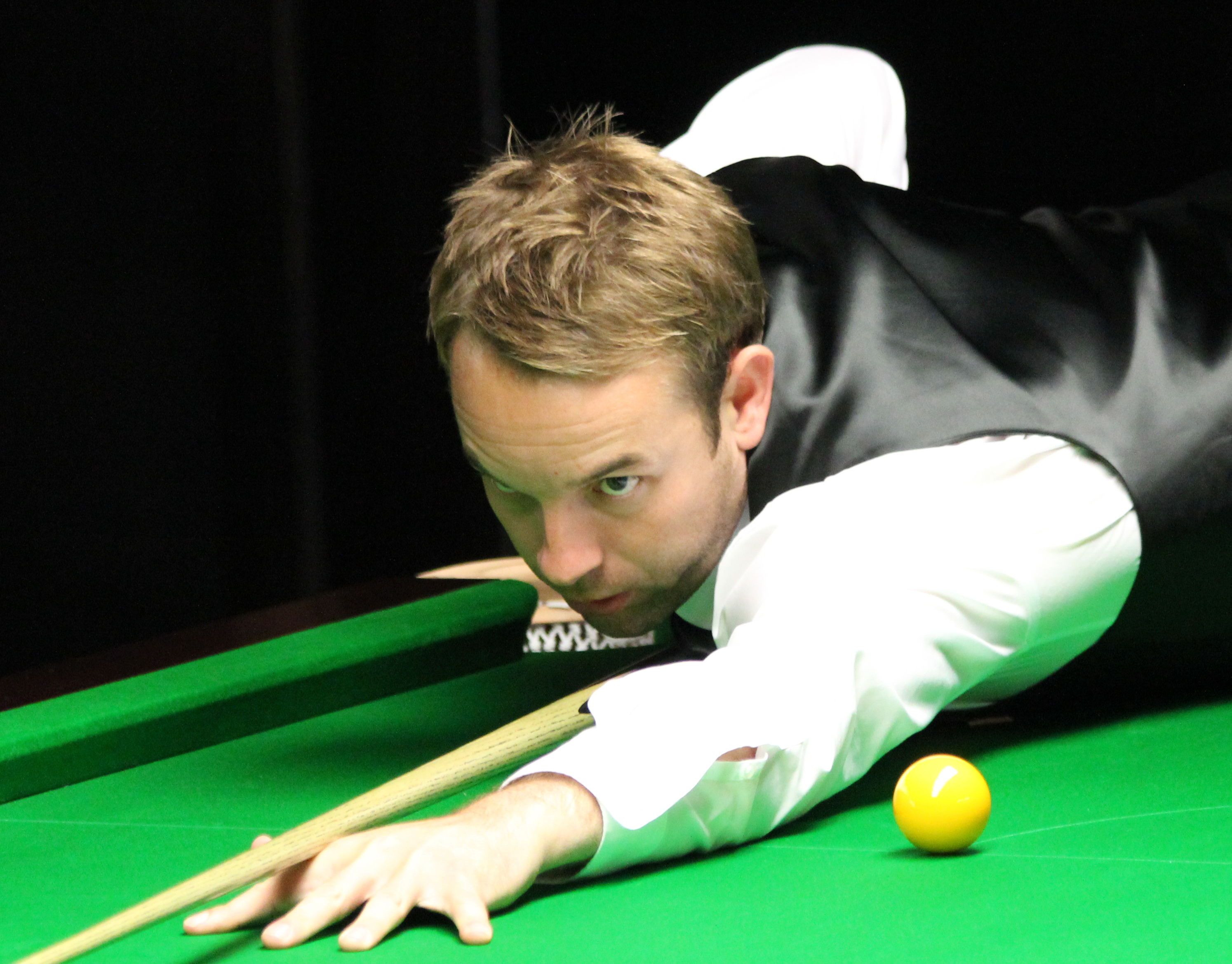 Ali Carter beim Paul Hunter Classic 2012